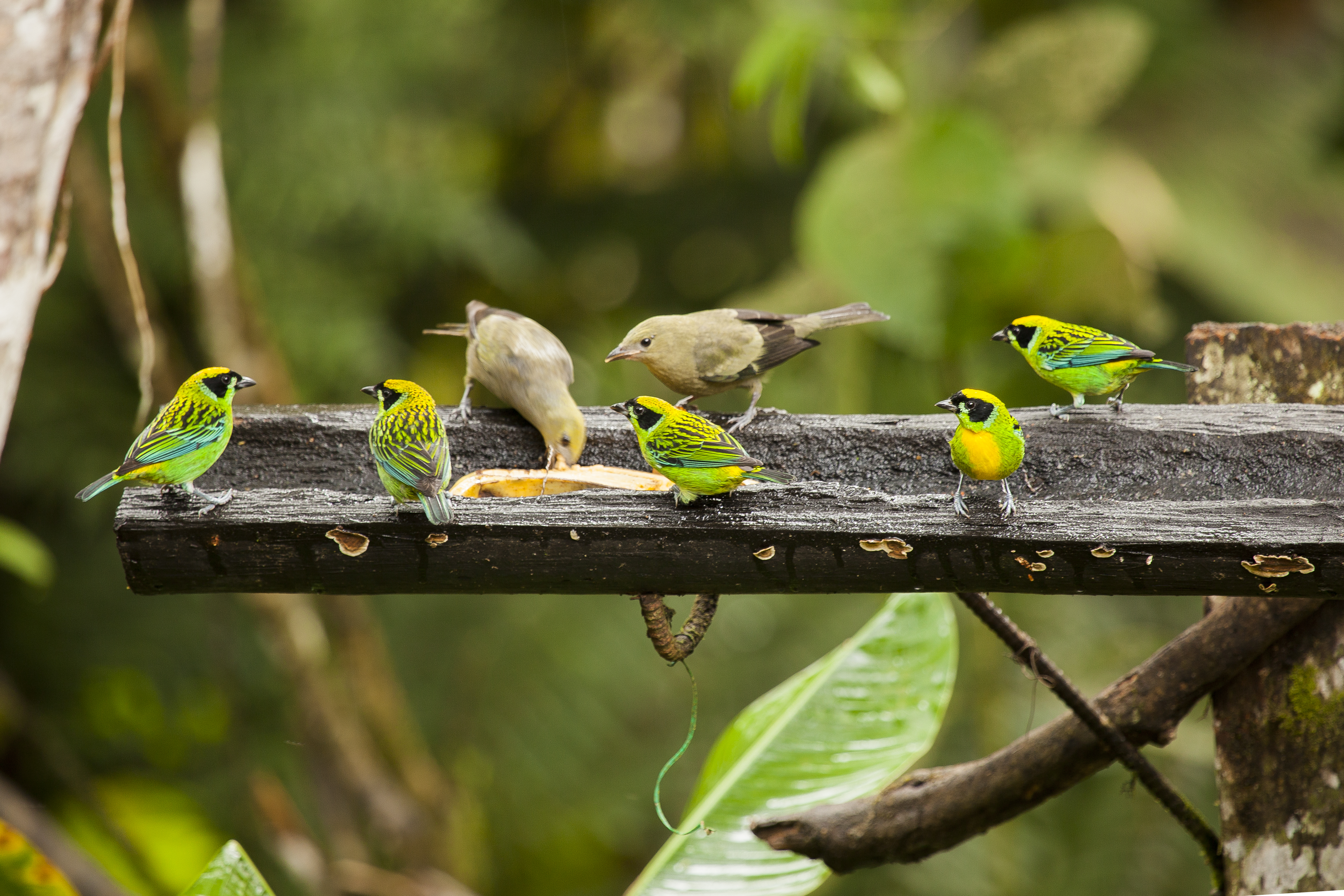 746 especies de aves en la provincia